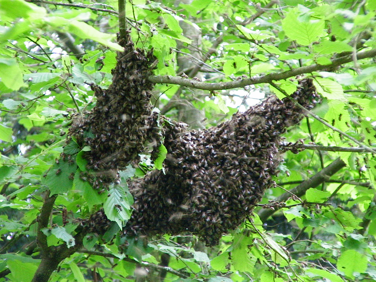 Essaim d'abeilles posé sur une branche d'arbre Photo prise le 27/05/2006 par F5ZV